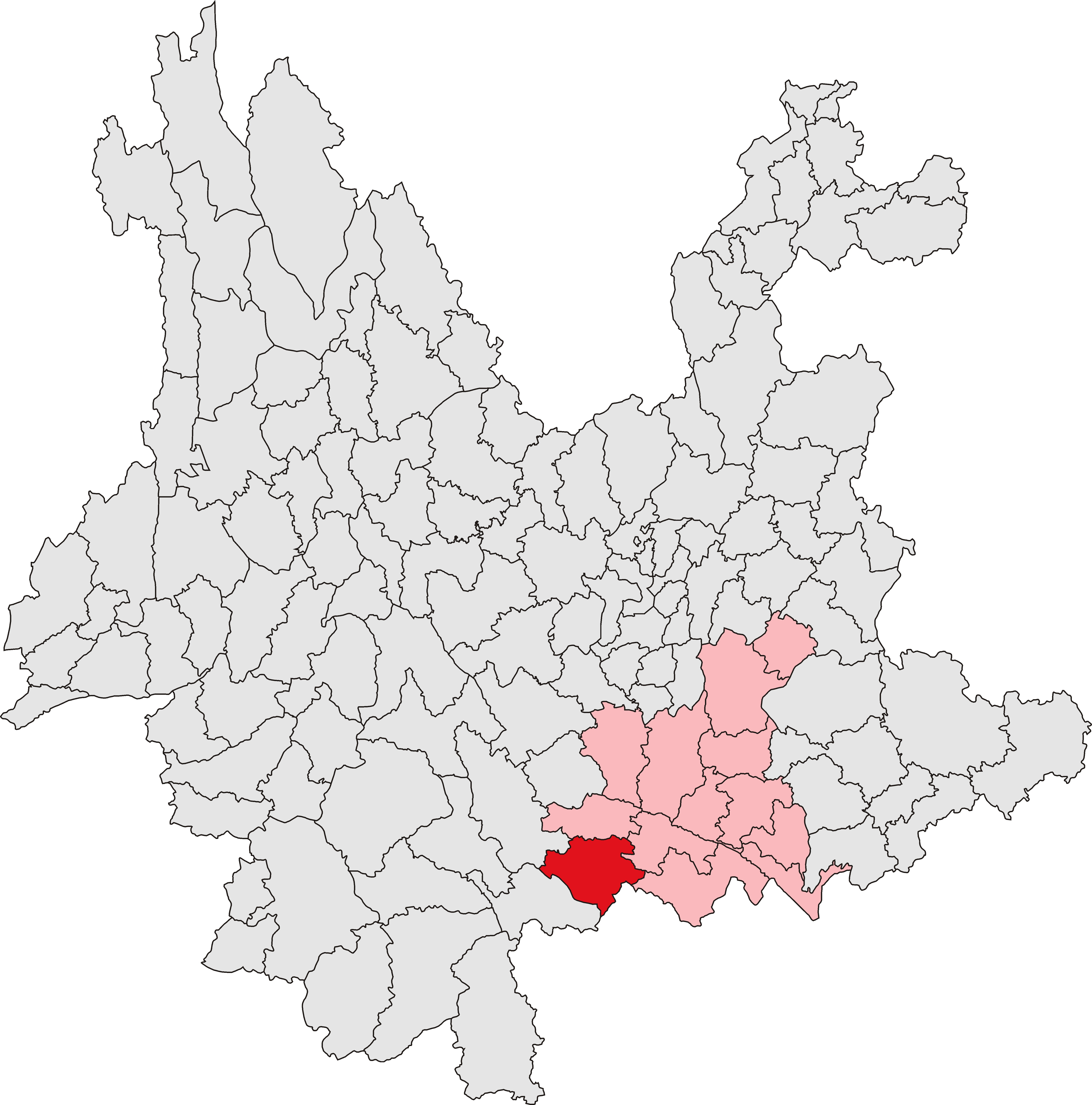 绿春县位置图